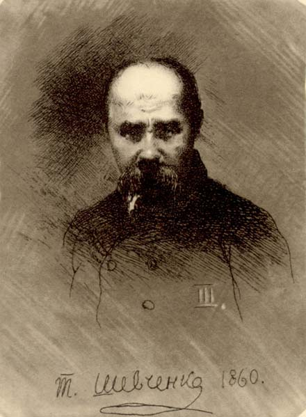 Self-portrait